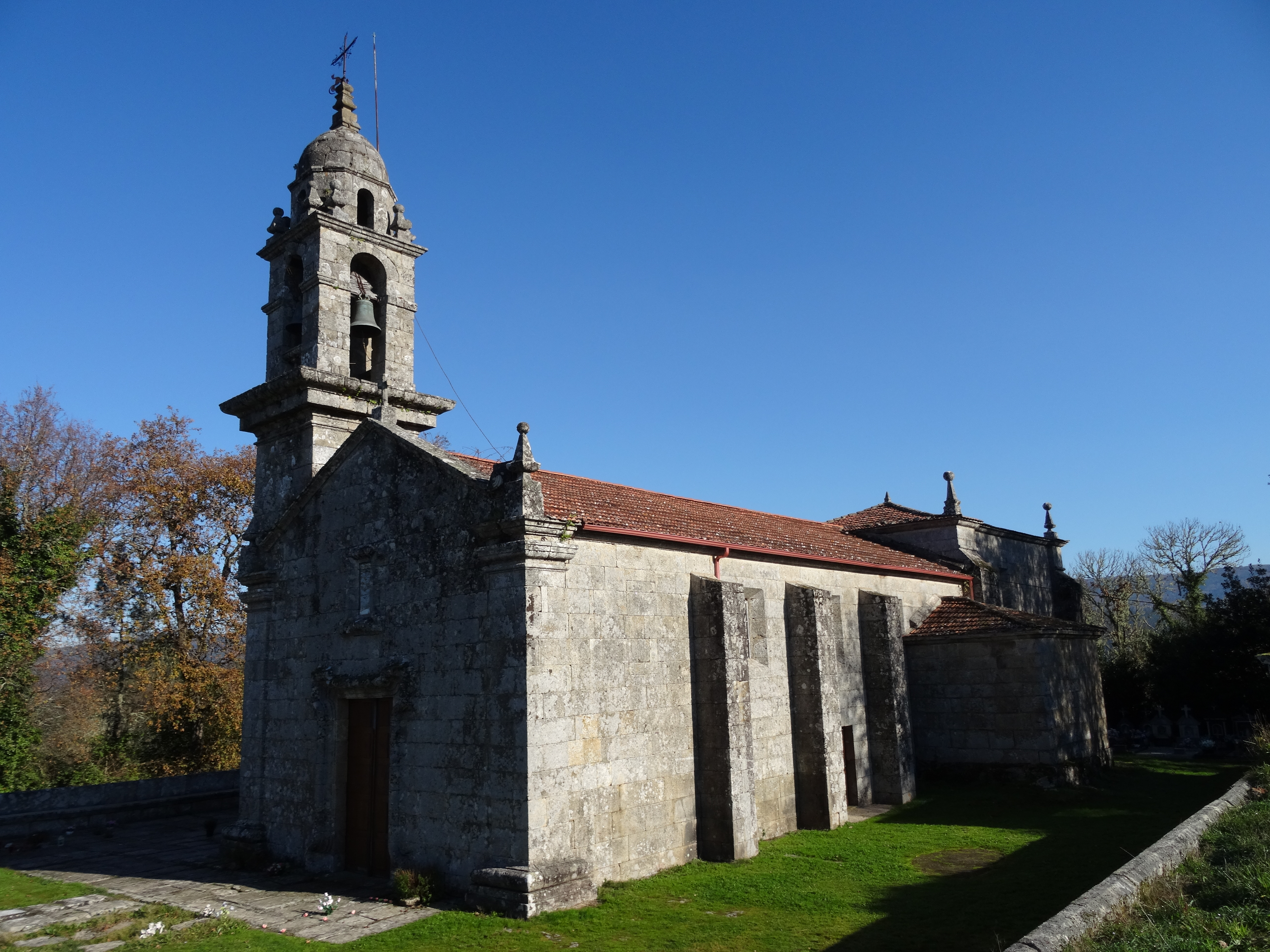 Ver título.